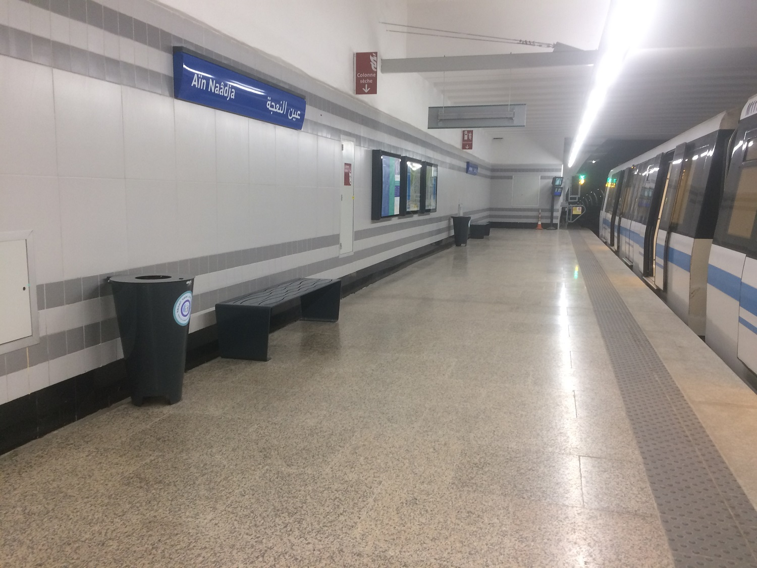 Quai de la station Ain Naadja